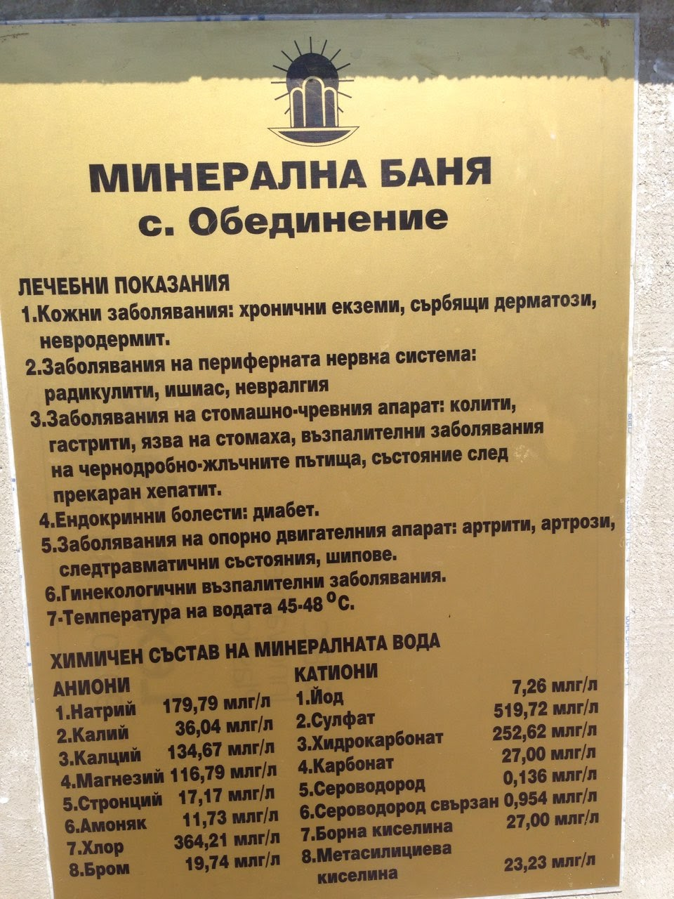 Лечебни показания и химичен състав на минералната вода в с. Обединение